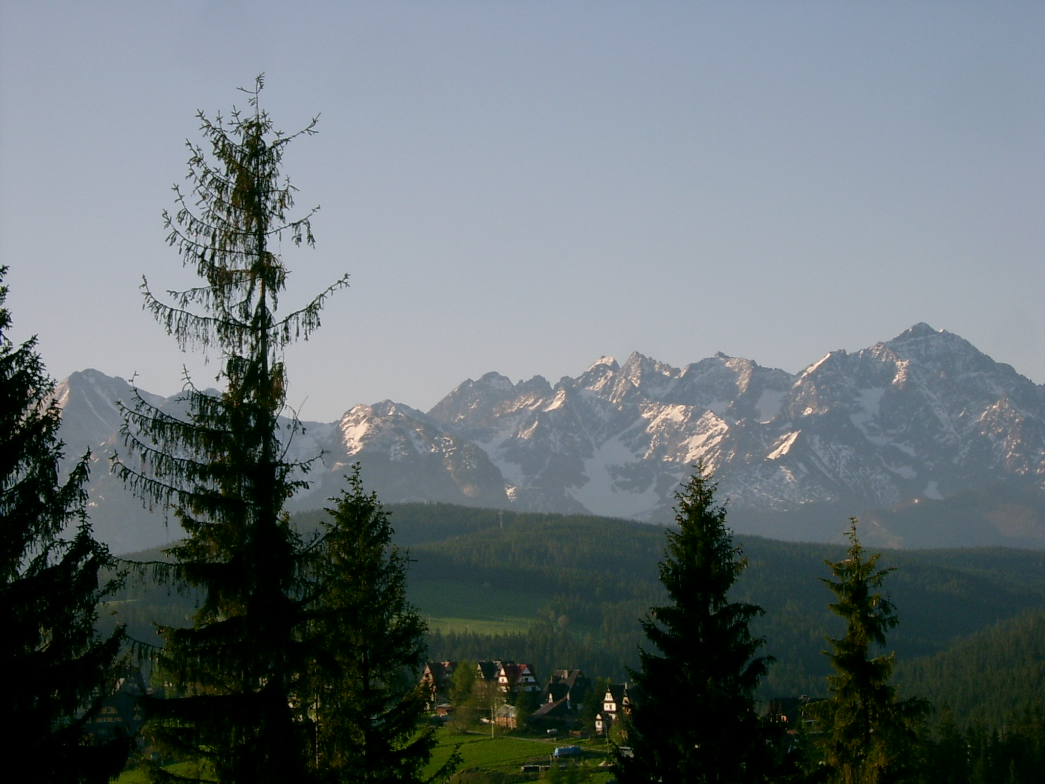 Widok z Bukowiny Tatrzńskiej